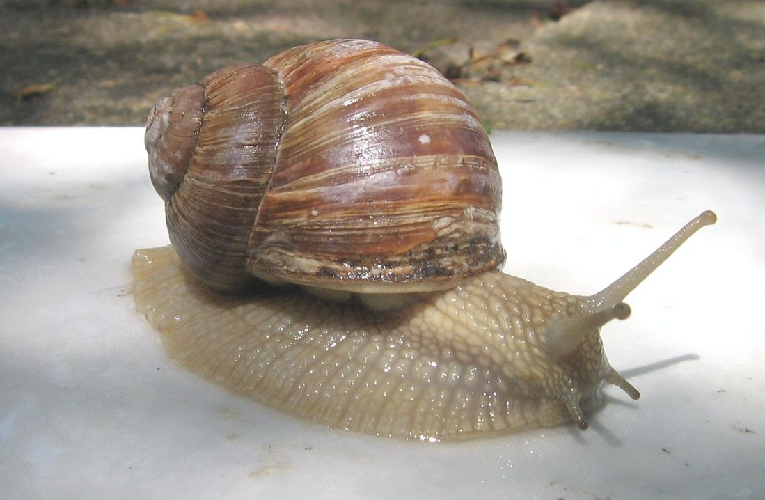 escargot de bourgogne - Helix pomatia